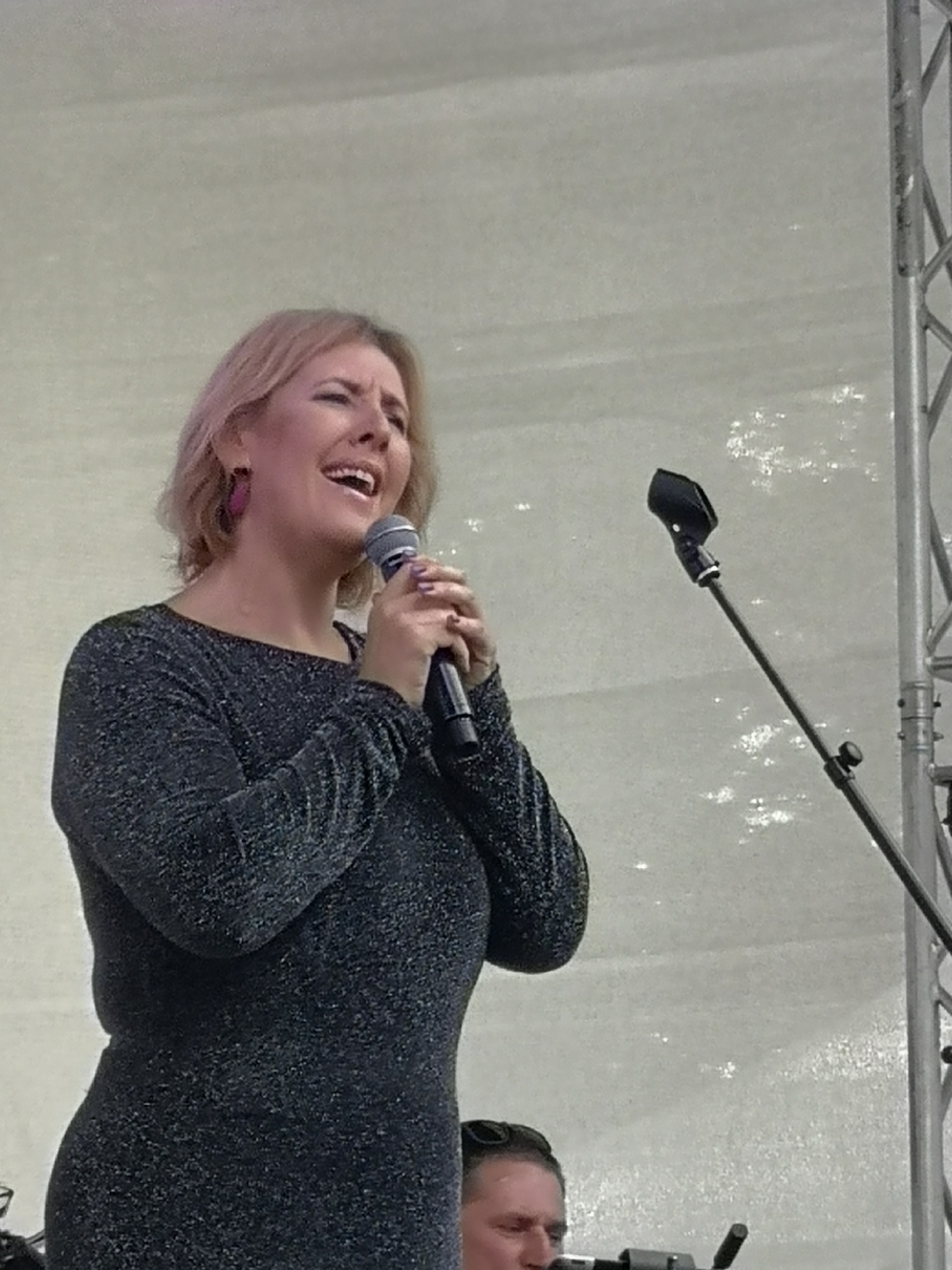 Kaire Vilgats esinemas Harjumäel 20. augusti väljakul